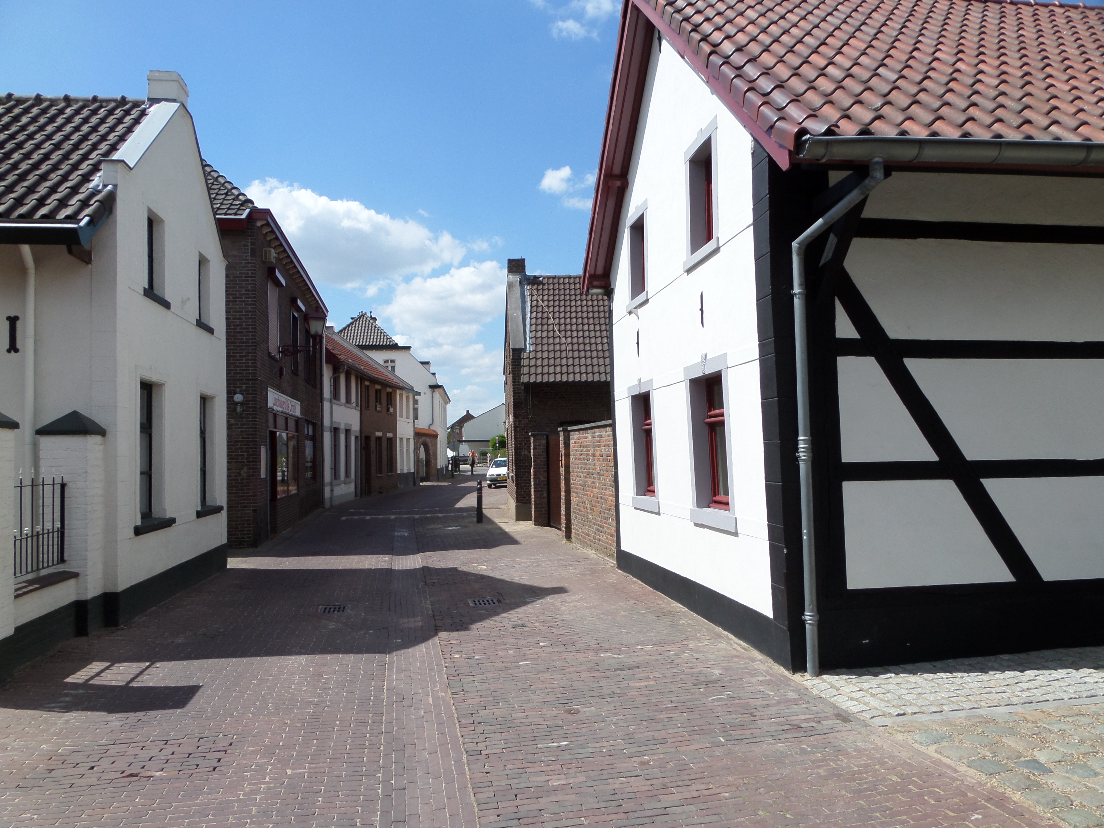 Historische woonhuizen aan de Steenstraat te Limbricht